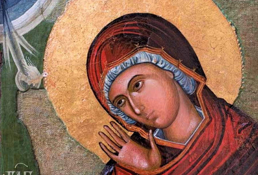 Света Богородица... Детал од царските двери од црквата свети Никола во село Зрзе